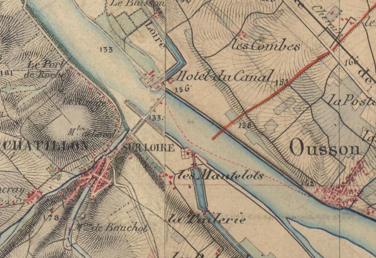 La Carte d'État-Major de 1820-1866 de Mantelot.